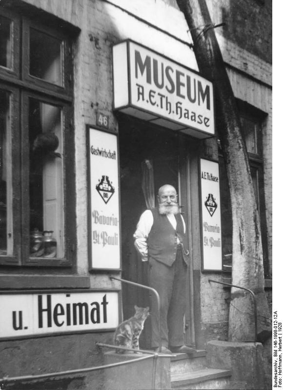 This description has been identified as biased or incorrect: Die Bildbeschreibung ist fehlerhaft: Die Museums-Gastwirtschaft von A. E. Th. Haase befand sich nie in Berlin, sondern immer in Hamburg, in der Erichstraße 46. / The image description contains factual mistakes: A. E. Th. Haase's museum/pub was never located in Berlin, but always in Hamburg, at 46 Erichstrasse.Berlin; Museum-Kurios Opa Haase hatte nicht nur die Gastwirtschaft, das füllte ihn nicht aus. Er sammelte alte Wasserpfeifen, ausgestopfte Tiere und hatte ein ganzes Zimmer voller Raritäten - ein Museum - und zeigte seine Schätze voller Stolz seinen Gästen. [ Nähe Kottbusser Tor ]; 1928